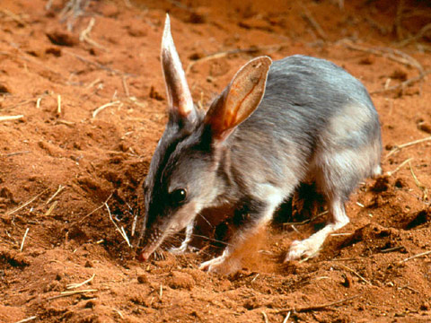 Macrotis lagotis buscando comida